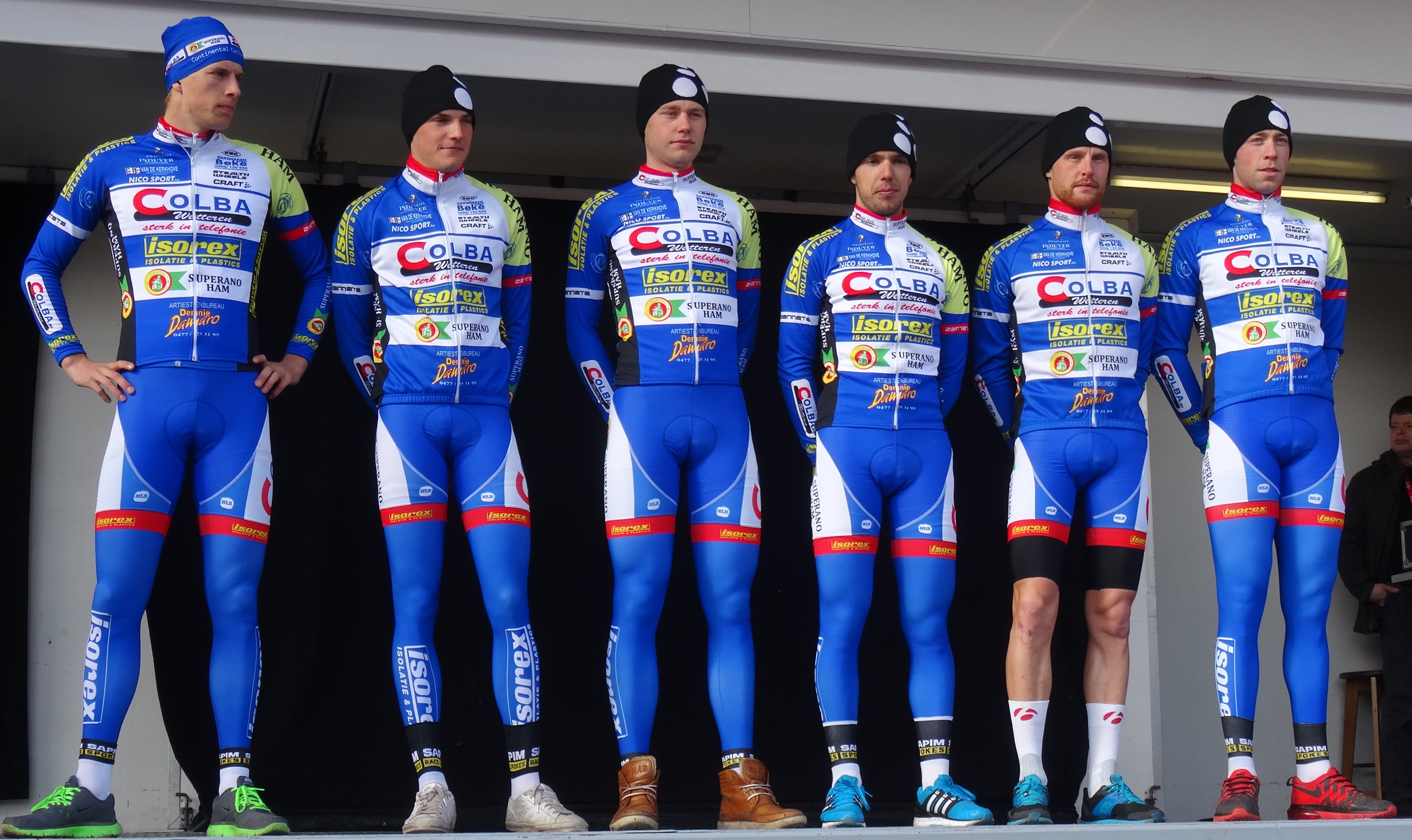 Reportage réalisé le mercredi 4 mars à l'occasion du départ du Samyn des Dames 2015 et du Samyn 2015 à Quaregnon, Belgique.